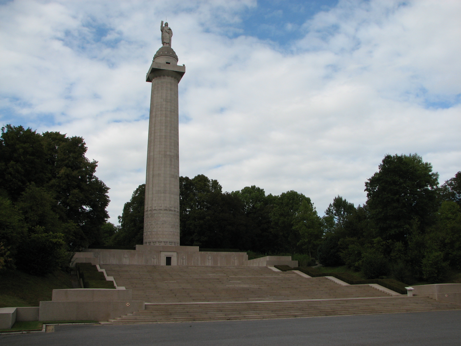 Monument américain de Montfaucon dans la Meuse.